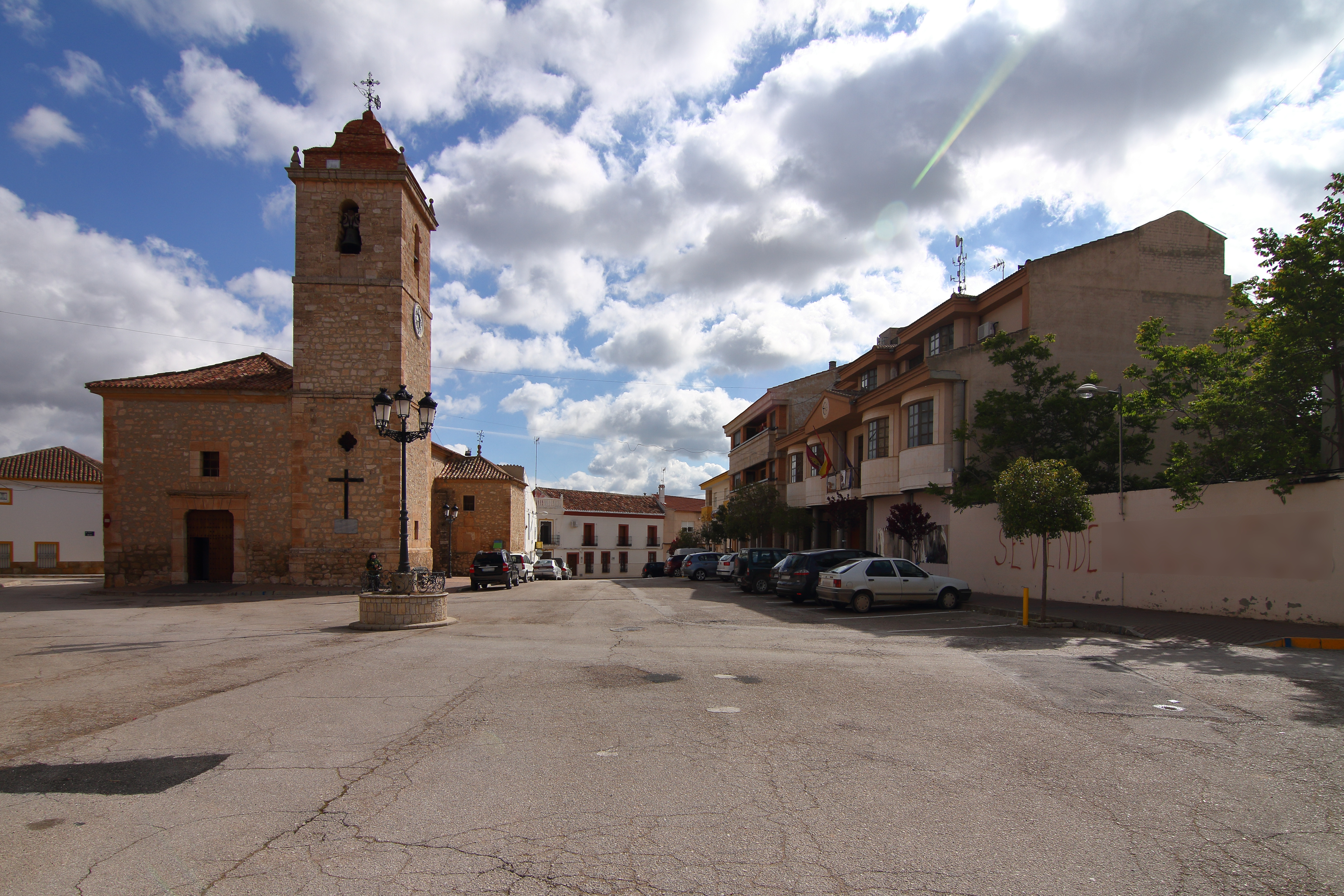 Casas de Juan Nuñez, Plaza de Castilla la Mancha, Iglesia y Ayuntamiento